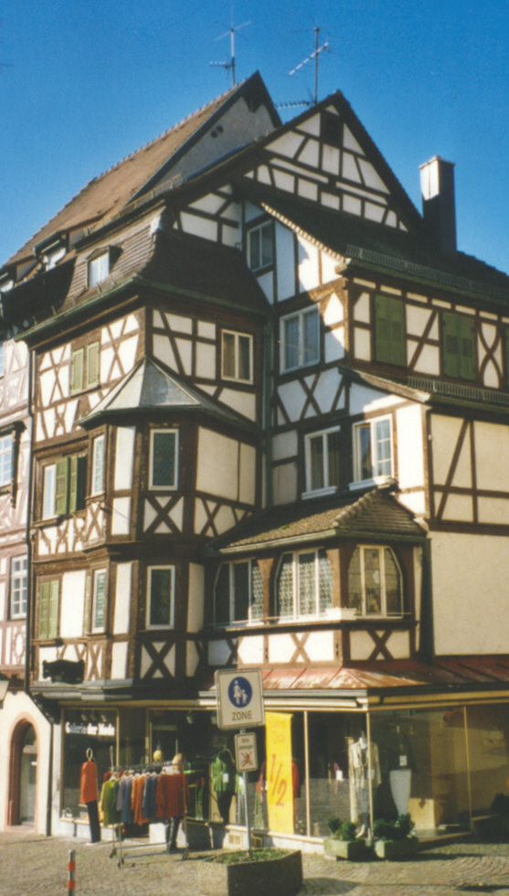 Mosbach : das ungewöhnlichste Fachwerkhaus der Stadt (am Marktplatz, direkt an das Palm`sche Haus grenzend). Dem 17./18. Jahrhundert entstammend zeigt es Verschachtelungen und kubische Vor- und Rücksprünge, die an die kubistische Phase von Malerei und Architektur zu Beginn des 20. Jahrhunderts erinnert. Mosbachs Picasso!